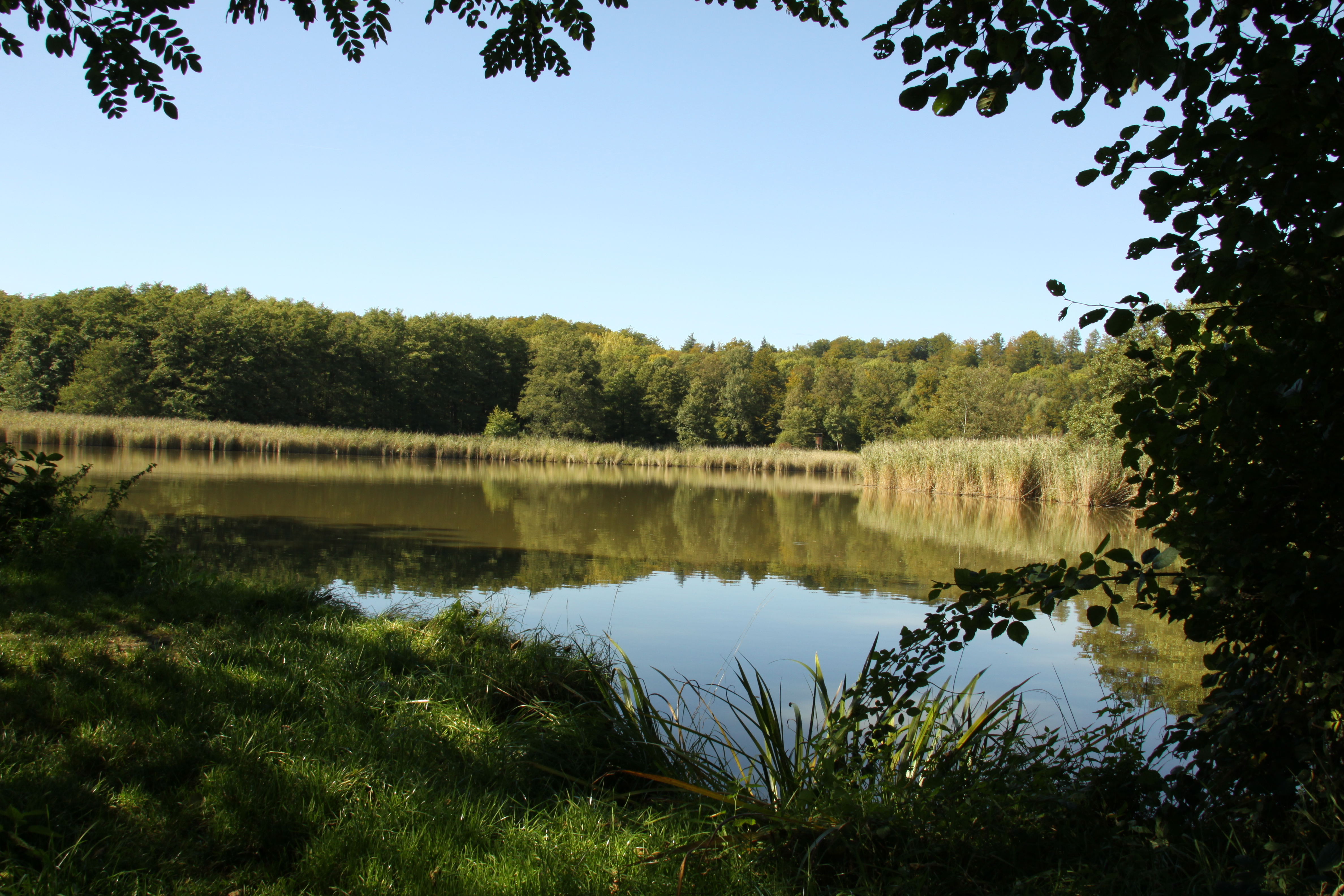 Rößlesmahdsee